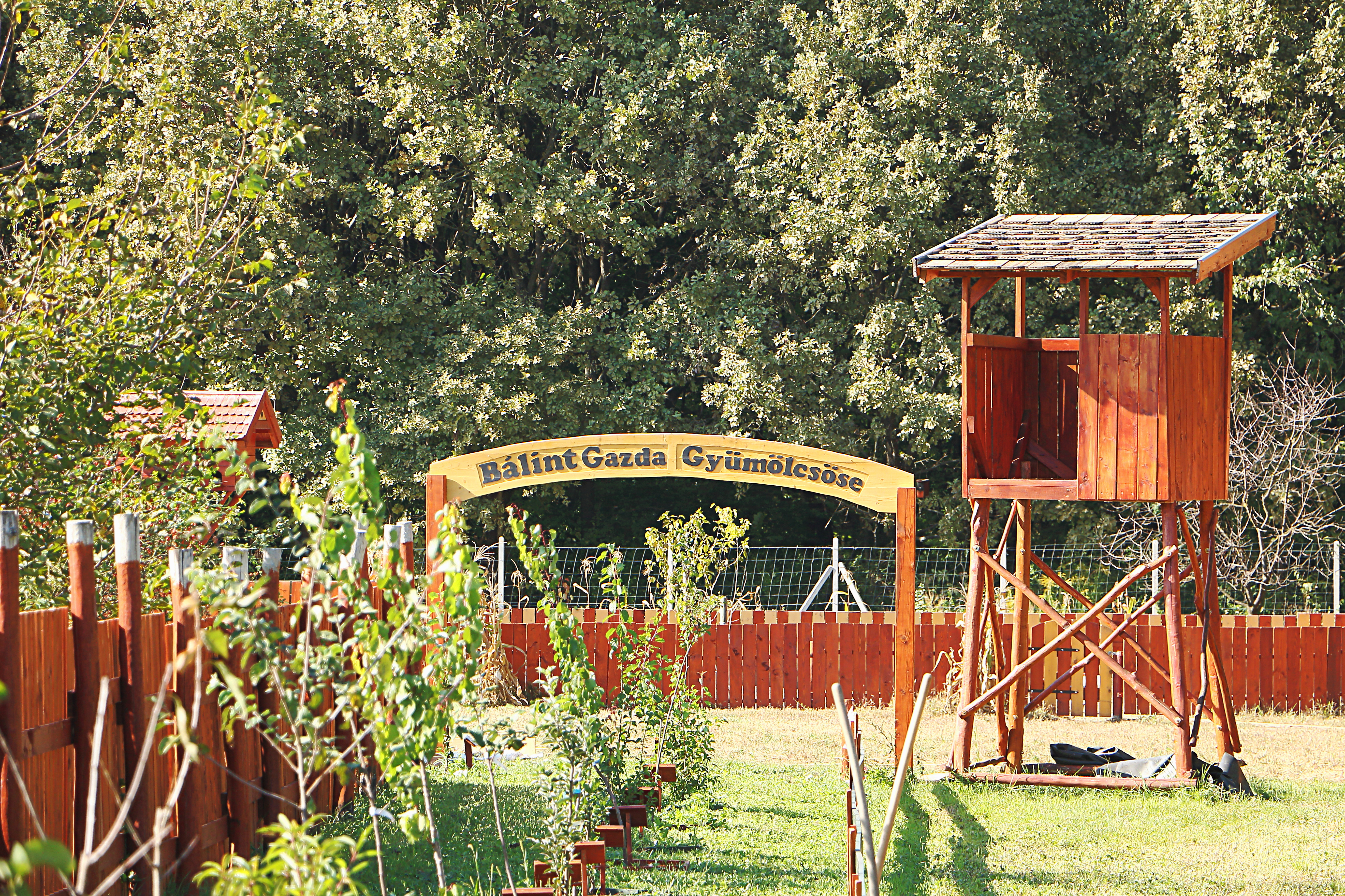 Bálint Gazda Gyümölcsöse a Rákosmenti Mezei Őrszolgálat Központjában